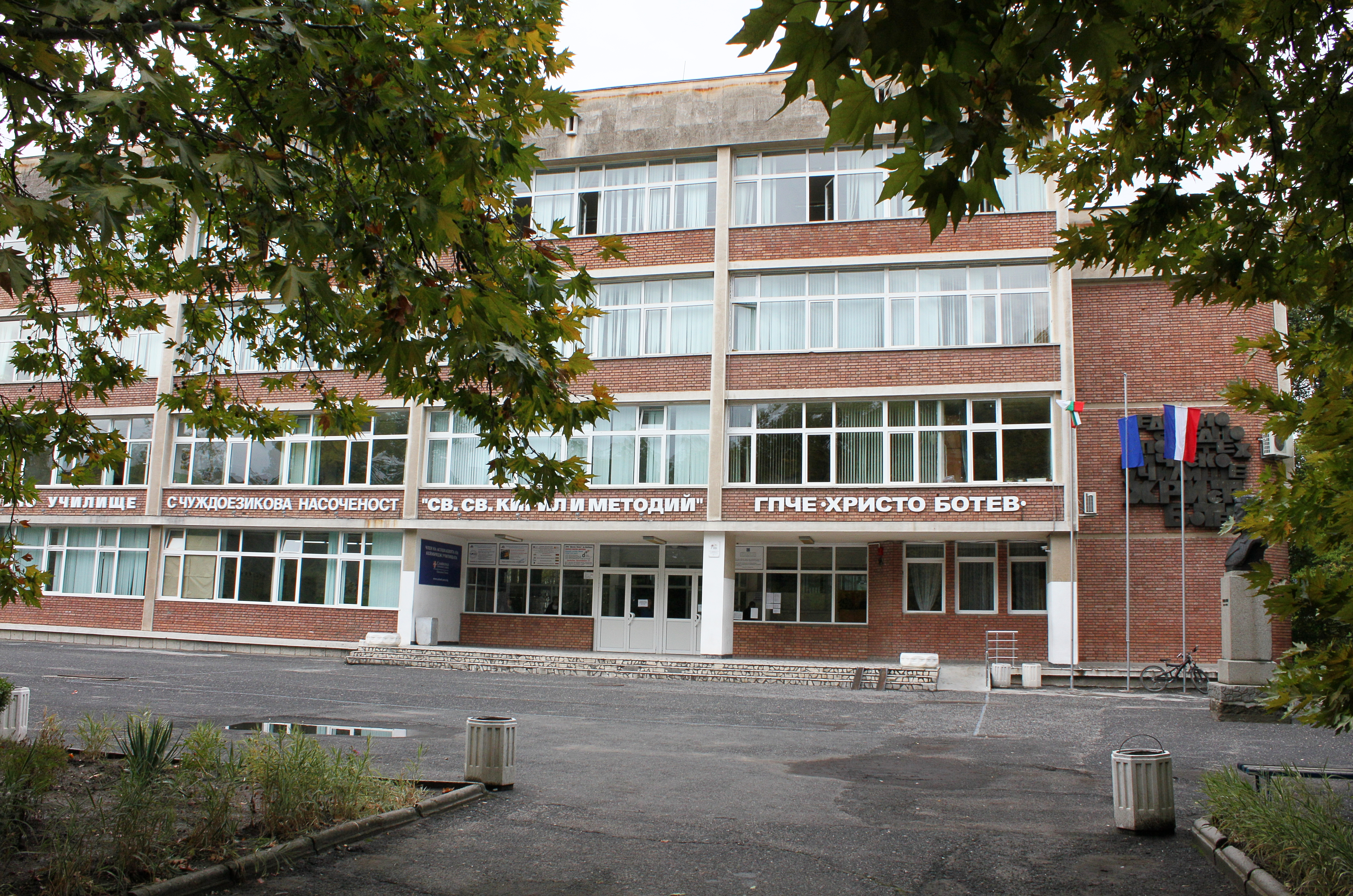 Kardschali; Bulgarien